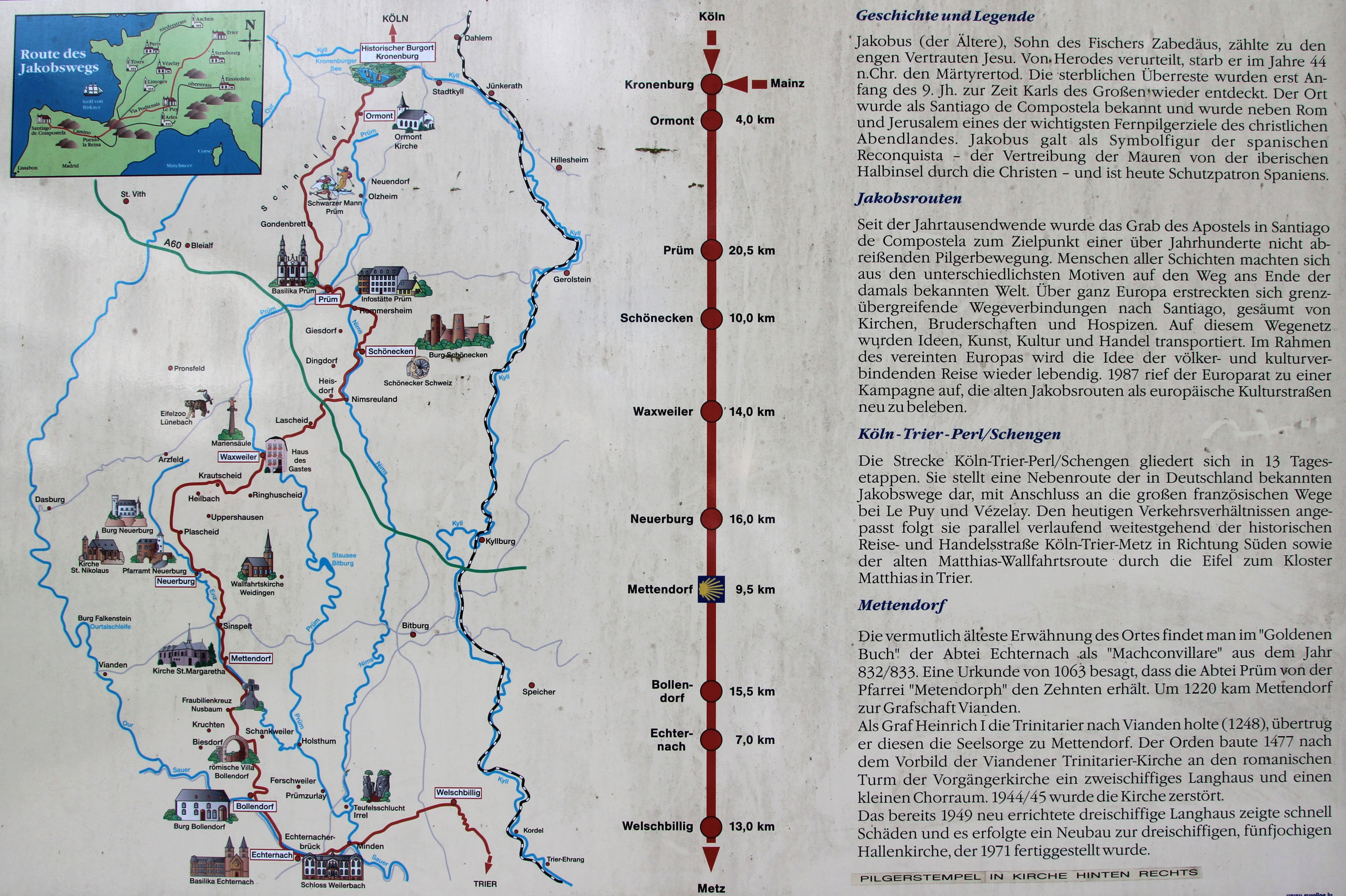 54675 Mettendorf, Im Fronhof 3. Jedes Jahr pilgern unzählige Menschen nach Santiago de Compostela (Nordspanien). Wenn man die Reise vom Rheinland aus beginnt, gibt es zwei Routen. Mettendorf befindet sich auf dem Weg von Köln/Bonn über Trier nach Schengen. Aufnahme der Informationstafel an der Kirche von 2017.